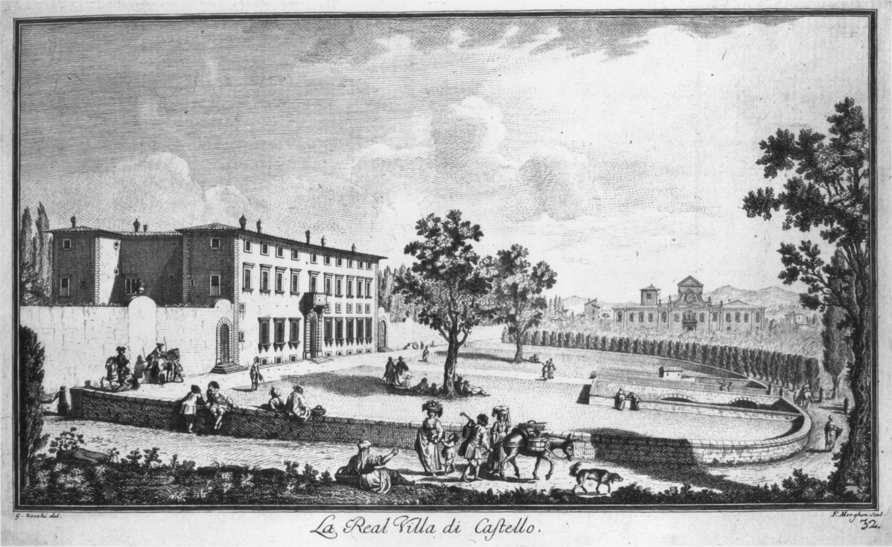 Zocchi, ville 34 castello